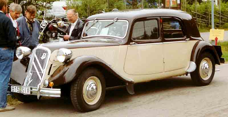 Citroen 15-Six Berline Normale